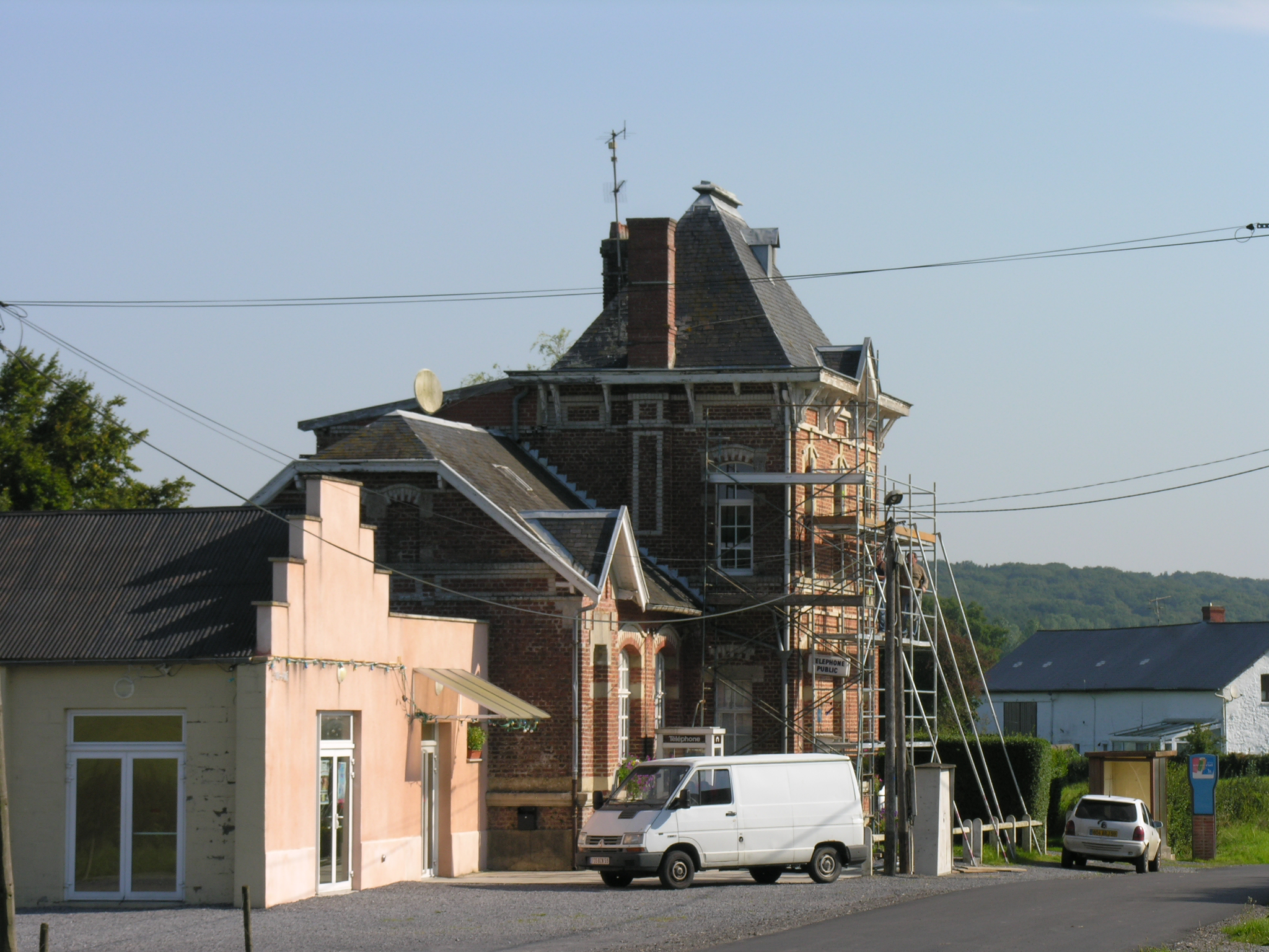 La mairie de Moustier en Fagne